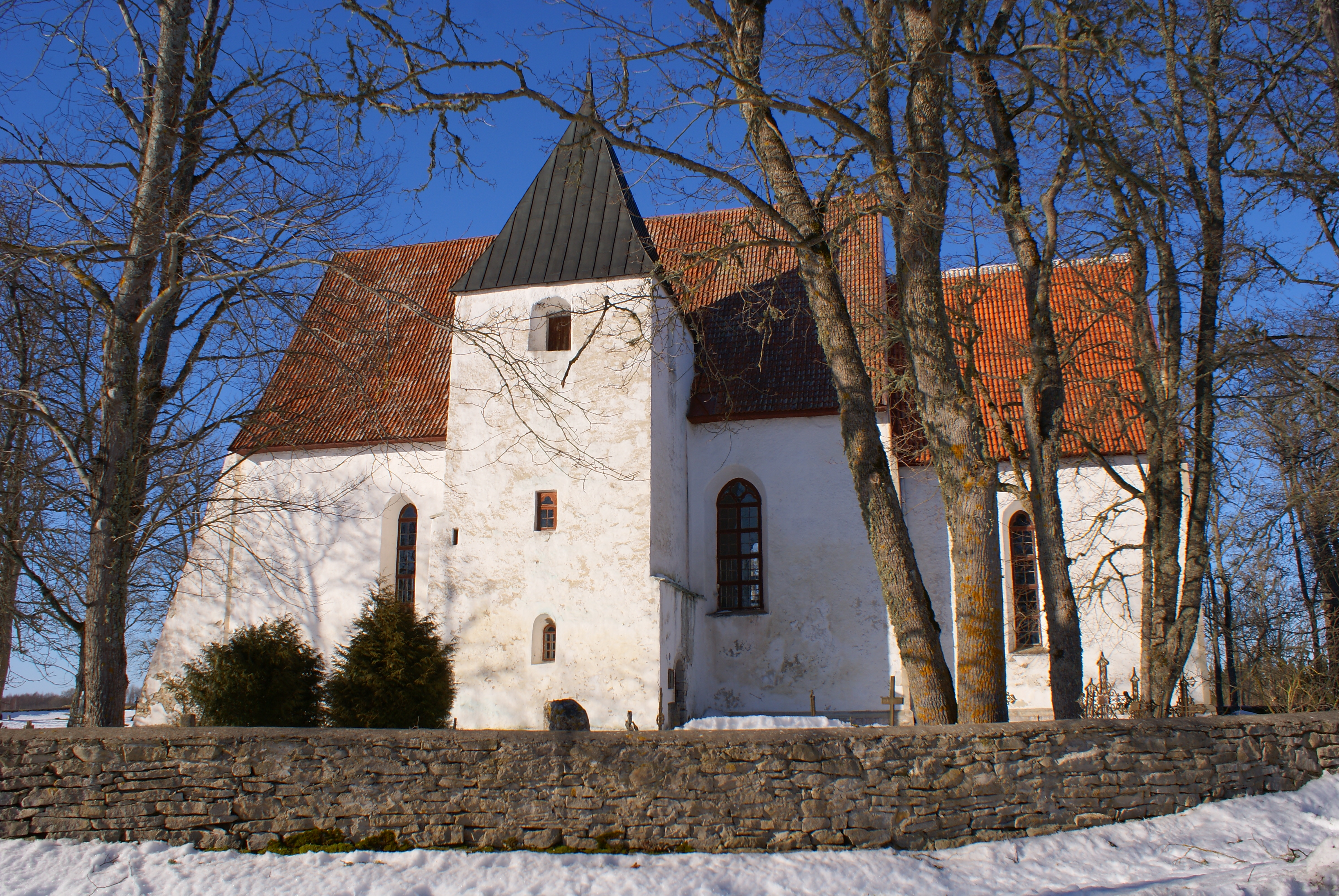 Ridala kirik